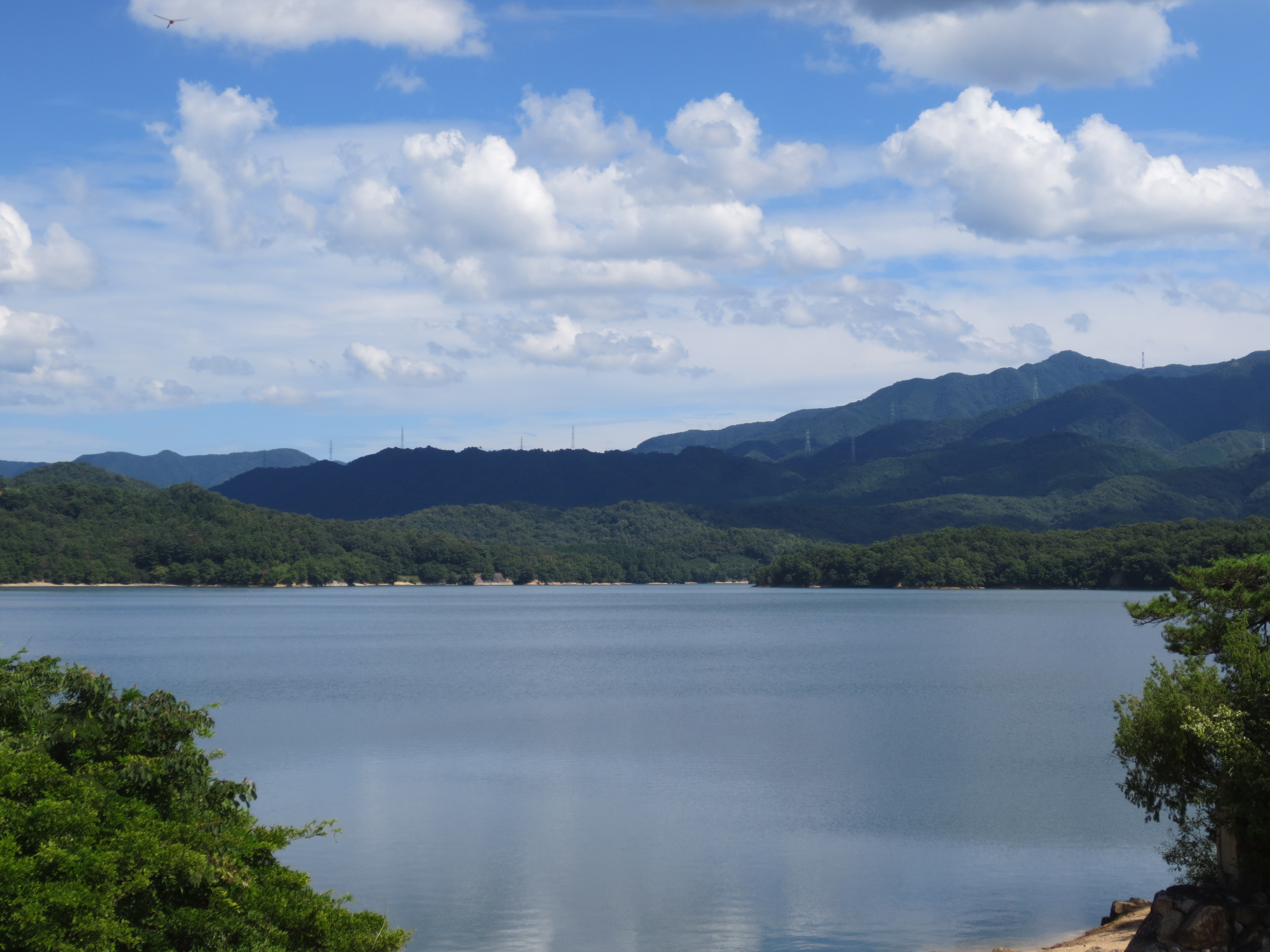 Mt. Daisen and Manno Lake